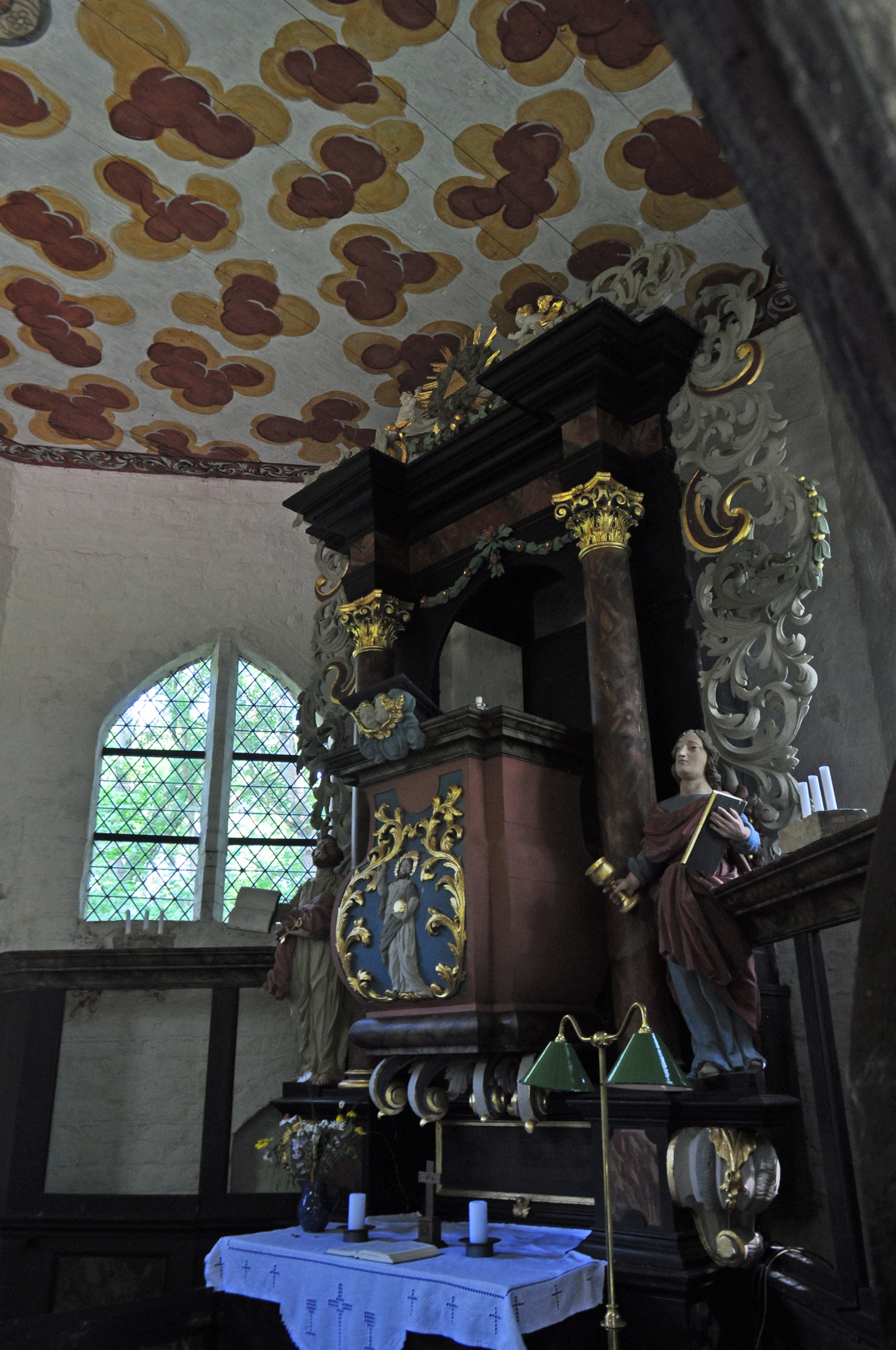 Kapelle Bessin, innen (Altar)